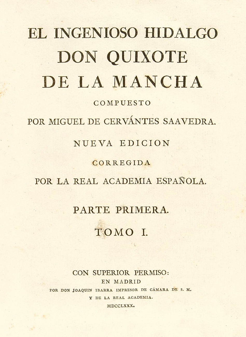 Portada de la edición ilustrada del Quijote de Joaquín Ibarra para la Real Academia Española de 1780. Referencia de la BNE Ediciones en línea: Lectura interactiva en